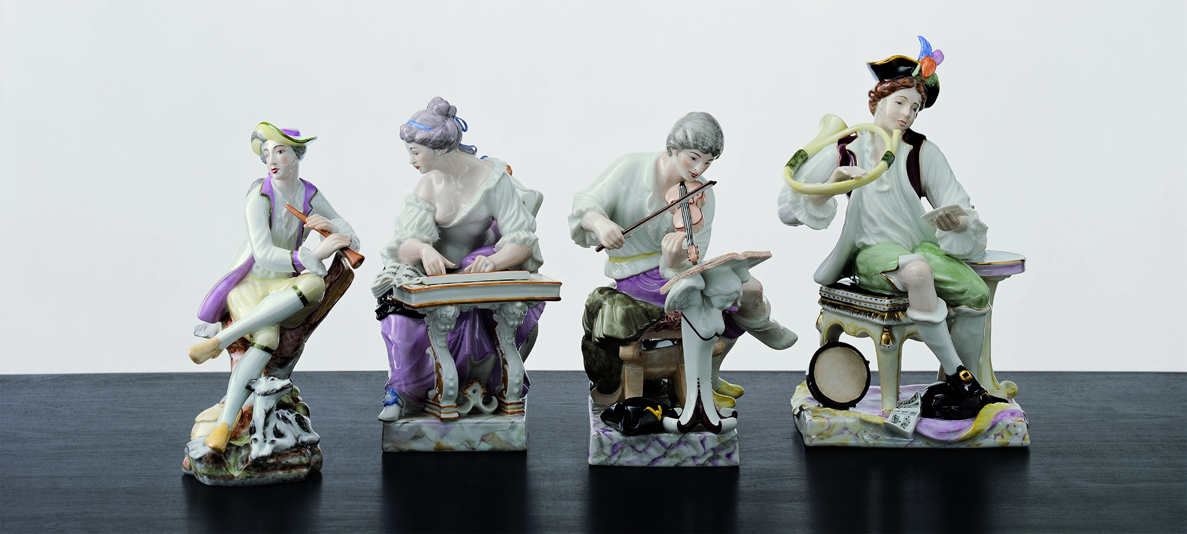 Porzellanmanufaktur Ludwigsburg GmbH, Porcelaine Figures